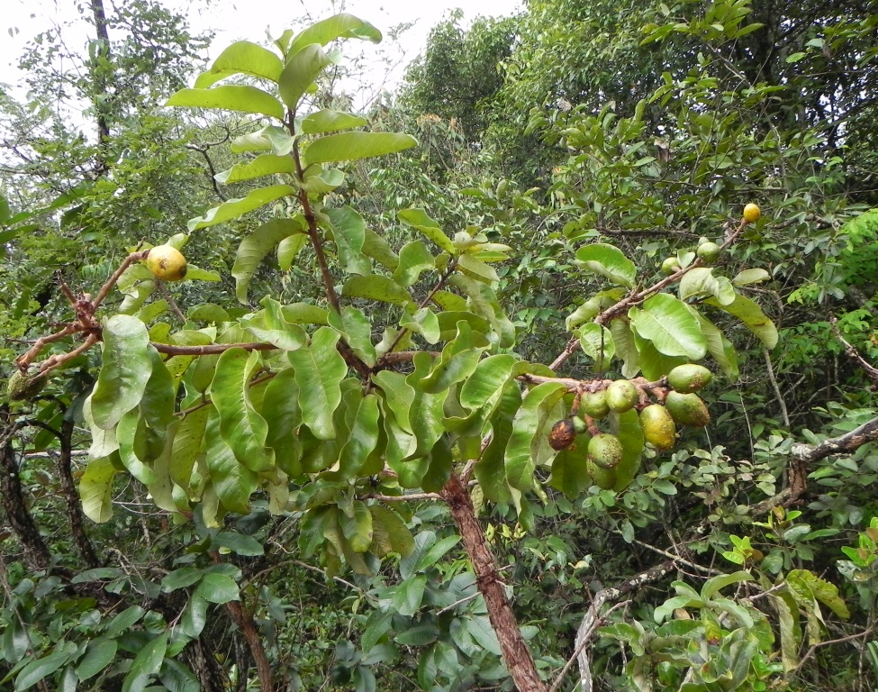 Couepia grandiflora (Mart. & Zucc.) Benth. ( sin. het. Couepia formosana Taub.; Moquilea grandiflora Mart. & Zucc.; Couepia suberosa Pilg.) - CHRYSOBALANACEAE - Jardim Botânico de Brasília - Brasília - Distrito Federal - Brasil.